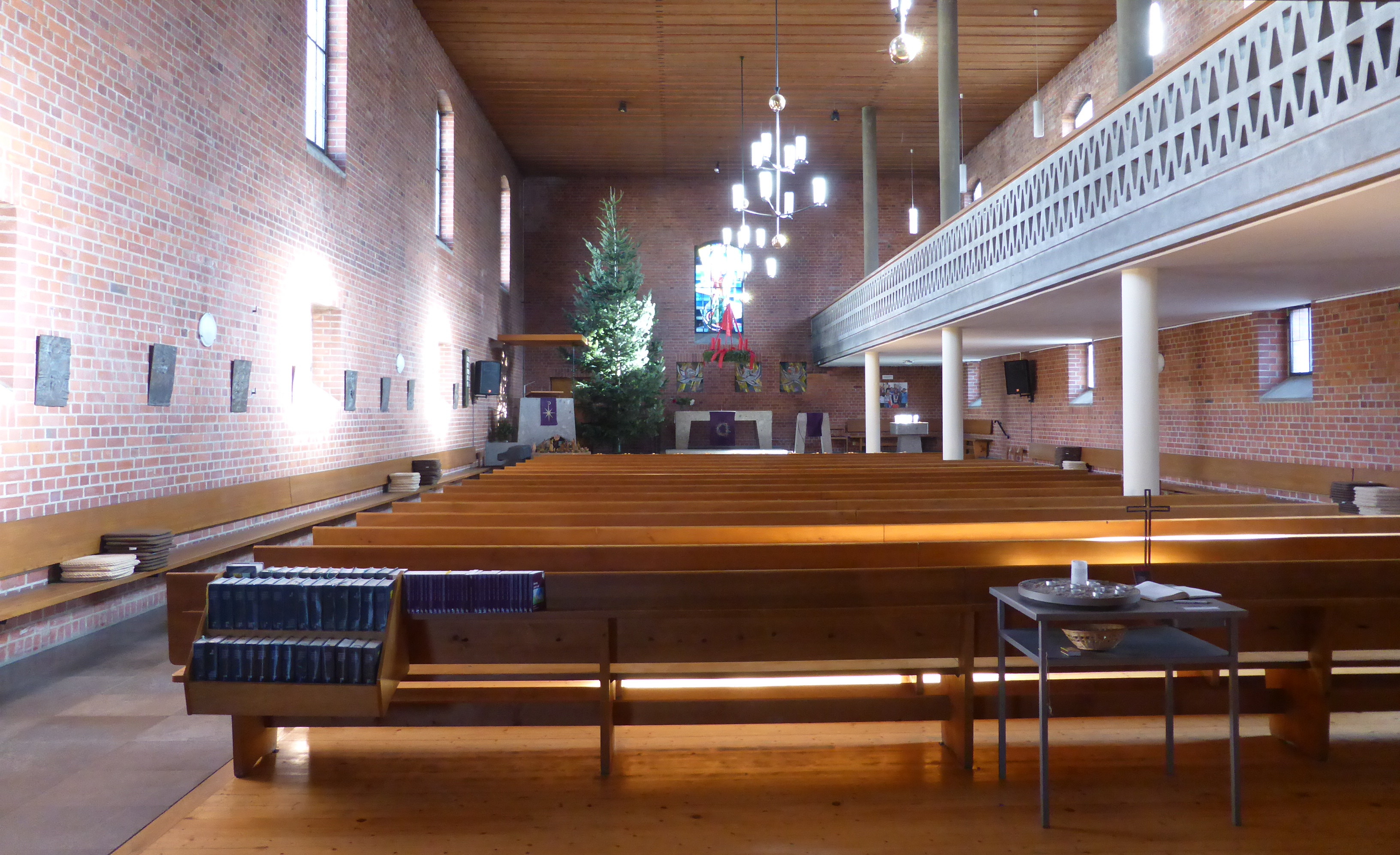 Der Innenraum der Dankeskirche in München-Milbertshofen zur Adventszeit.